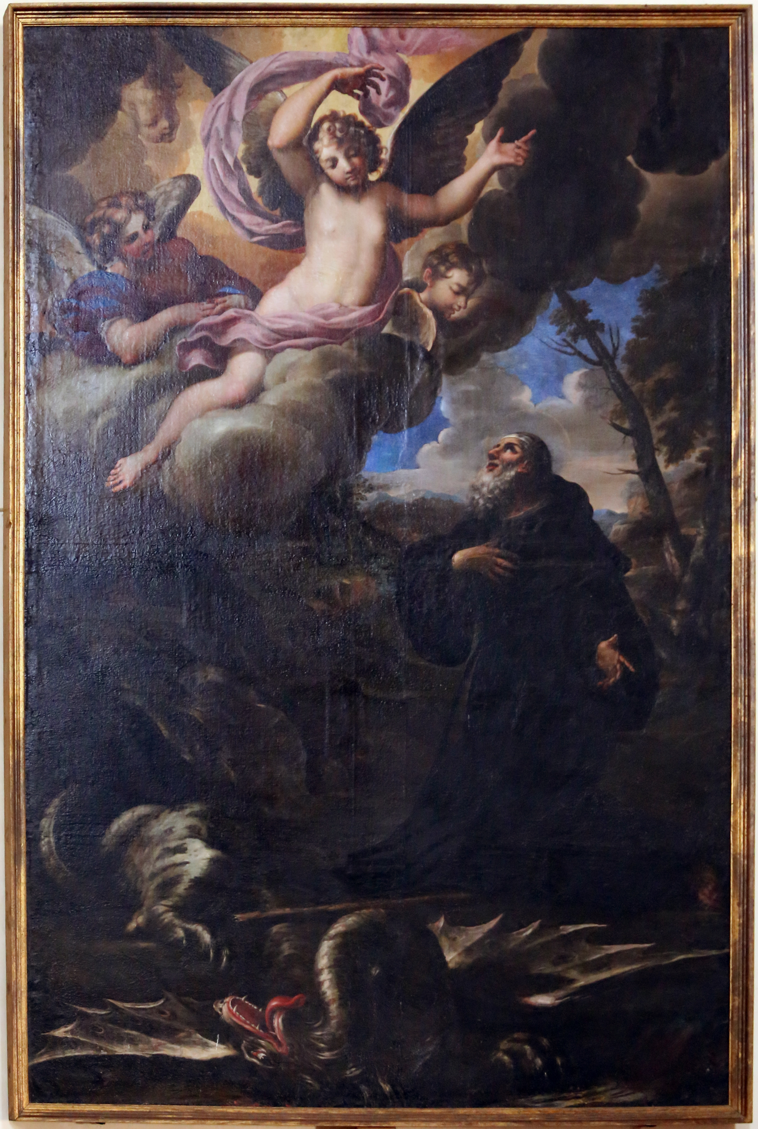 Sant'Agostino (Massa Marittima) This is a photo of a monument which is part of cultural heritage of Italy.